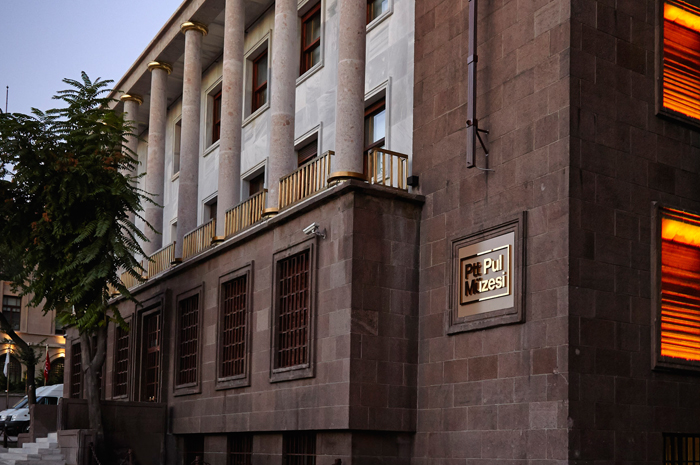 Ulus'ta yer alan PTT Pul Müzesi Binası